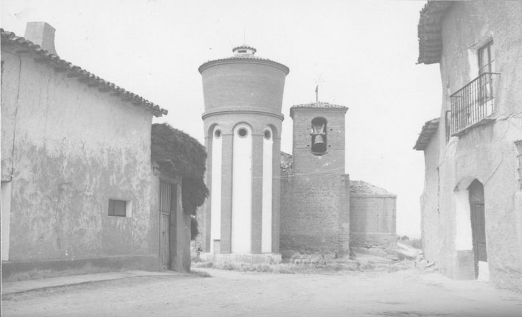 Vista - Melgar de Arriba (Valladolid) - Álbum 200 x 140 - Fotografía. Papel 120 x 85 B/N